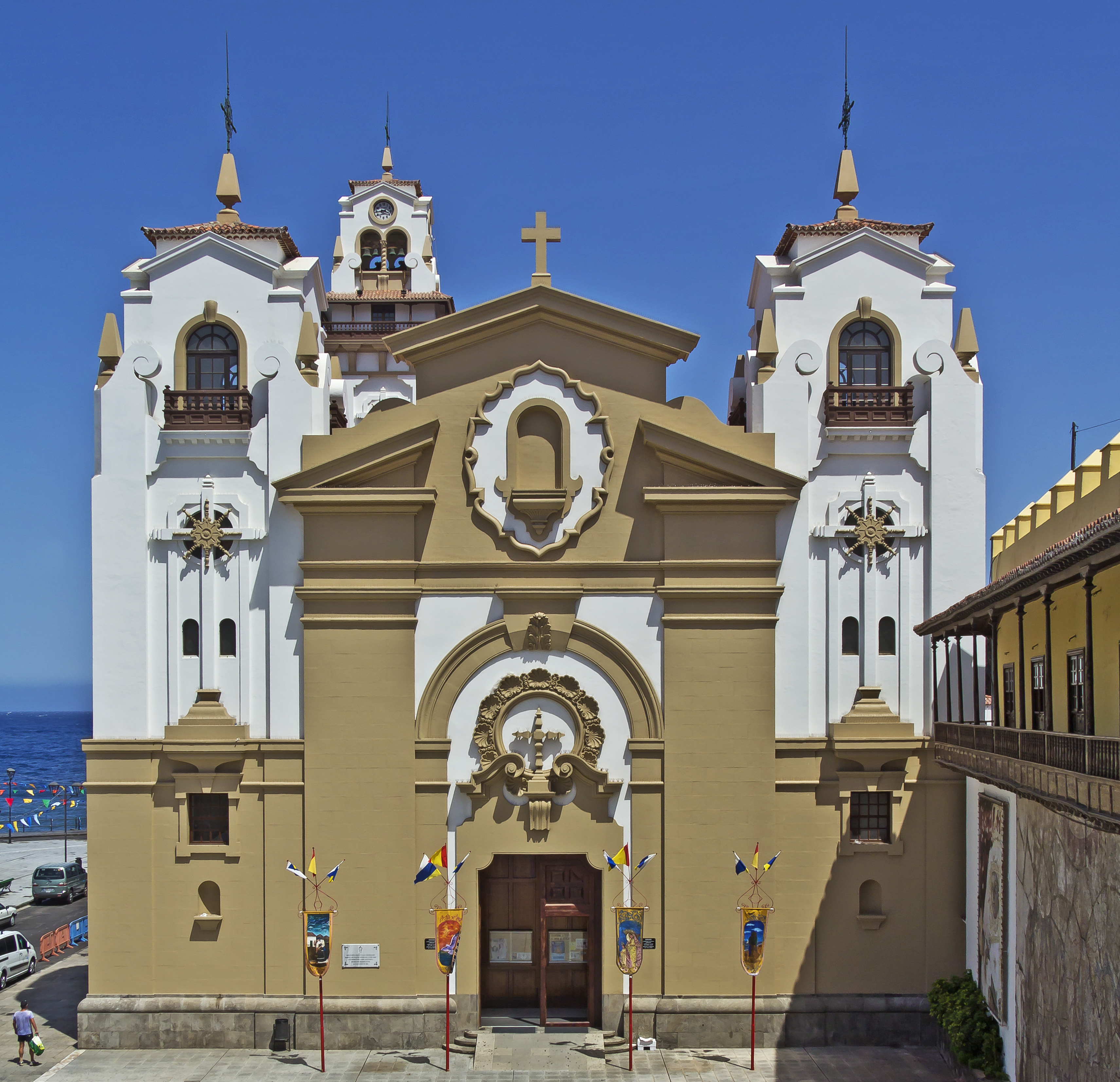 Basilika de Nuestra Señora de la Candelaria, Blick von Westen